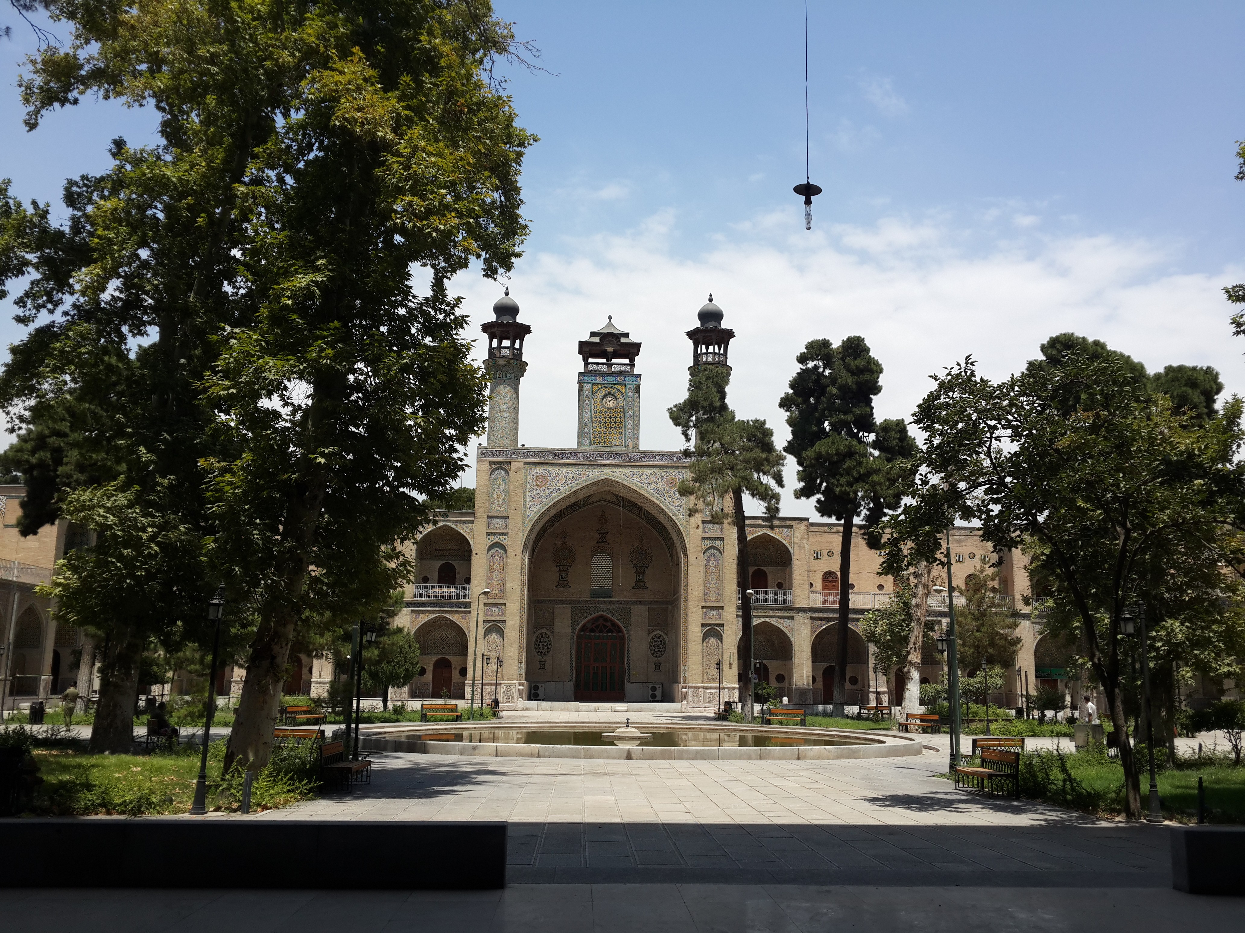 مسجد سپهسالار/ مدرسه عالی شهید مطهری